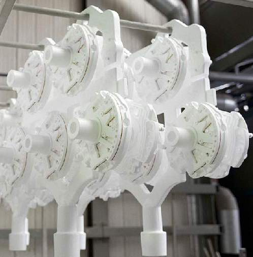 Original Handtmann Modelltraube